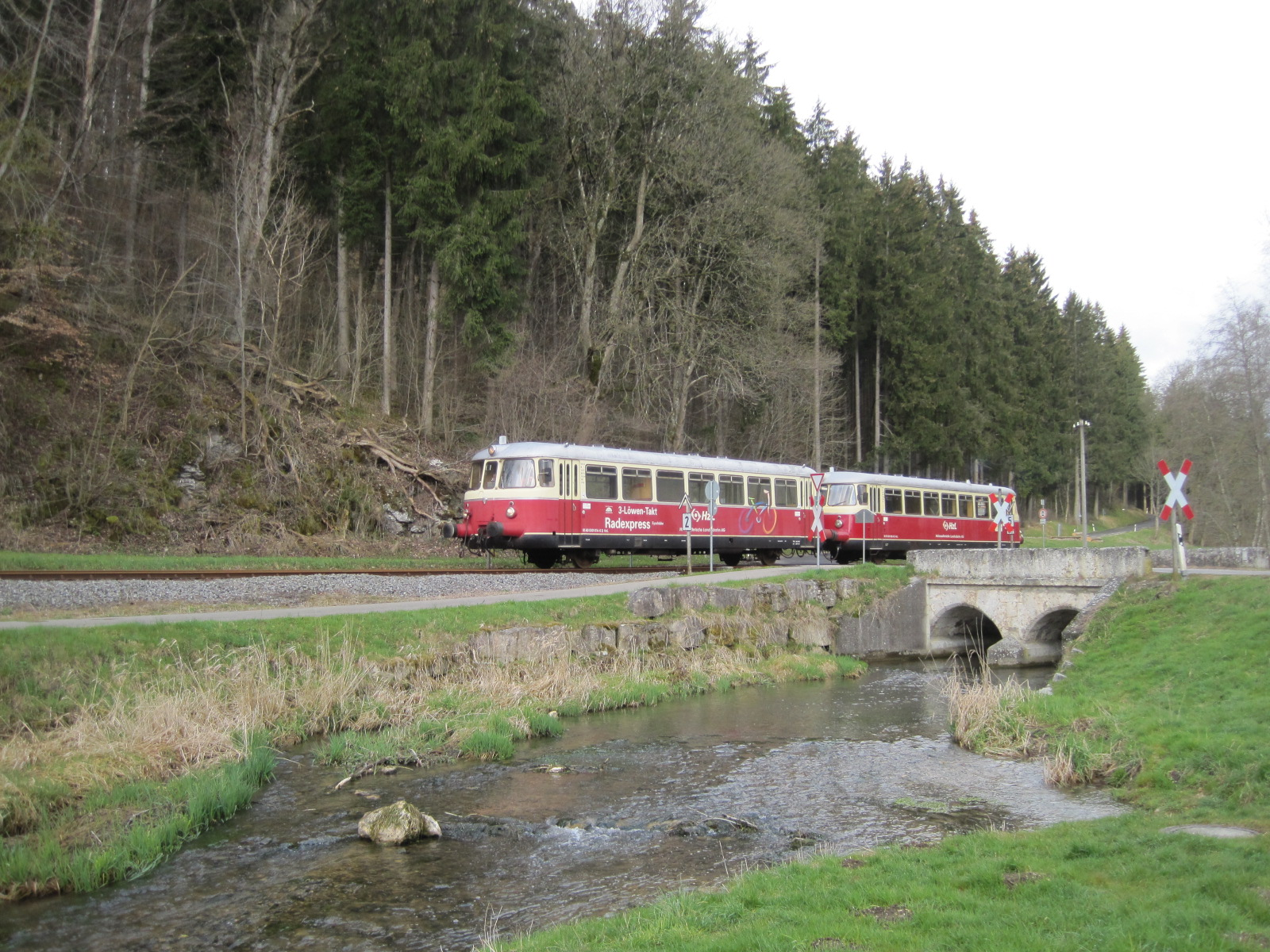 MAN Schienenbus auf der Schwäbischen Albbahn zwischen Kleinengstingen und Münsingen.